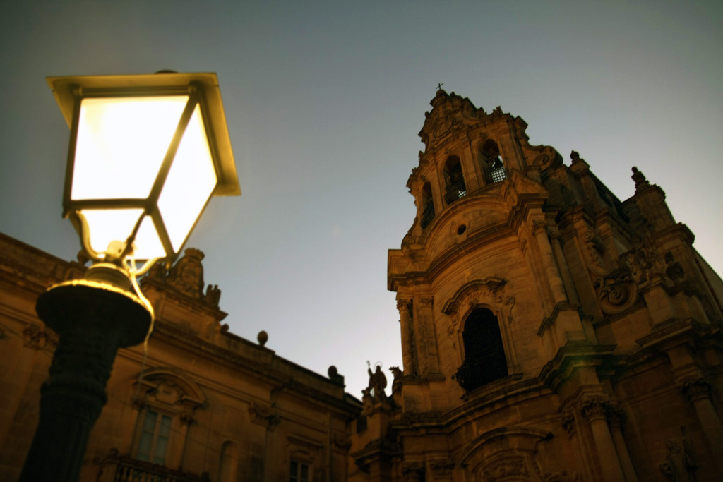 Chiesa di San Giuseppe (Ragusa Ibla)